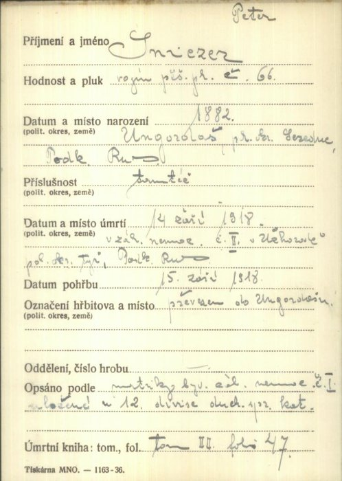 картка з військового архіву м. Прага... Шніцер Петро